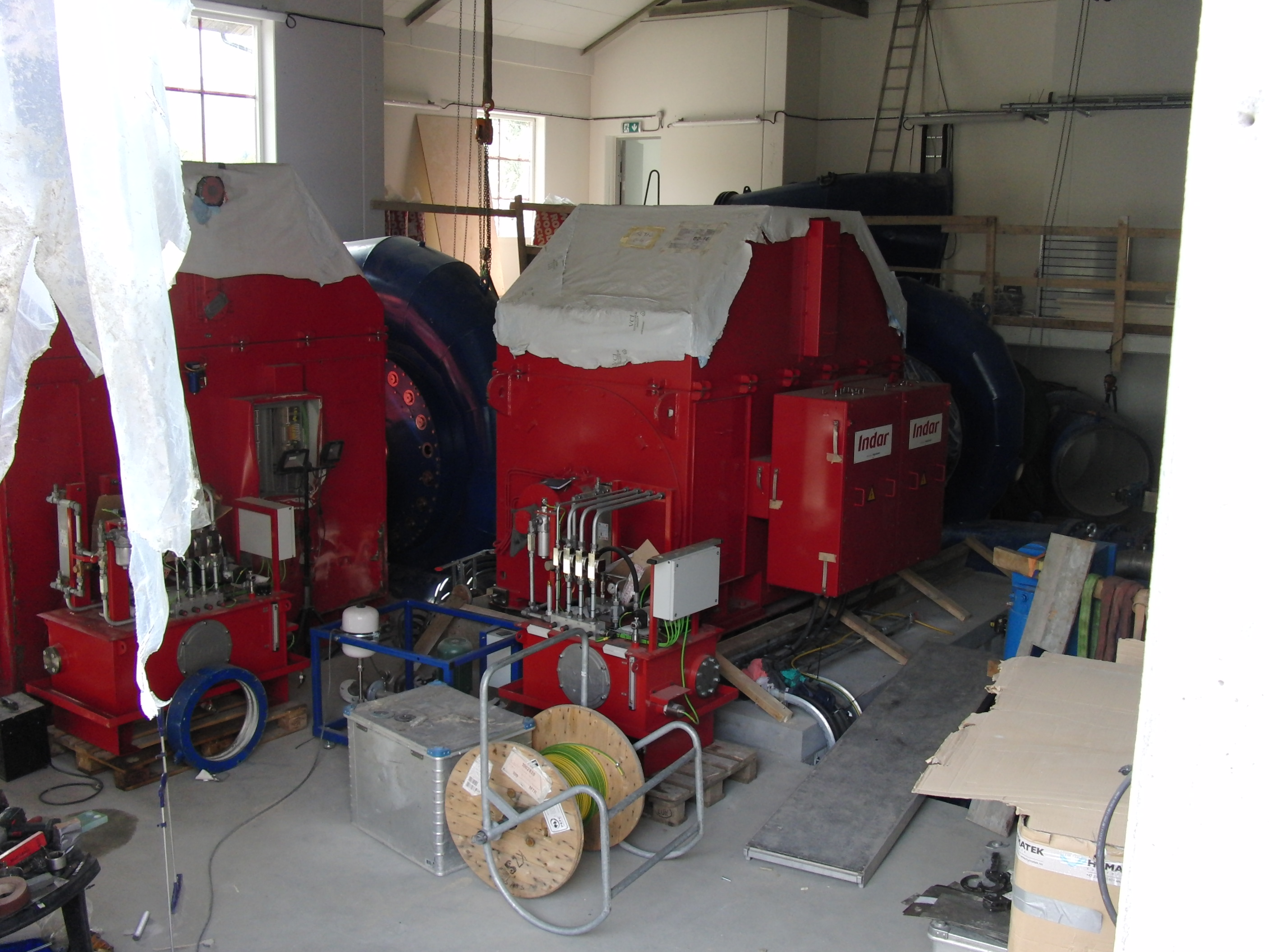 Anga kraftverk under bygging mai 2019